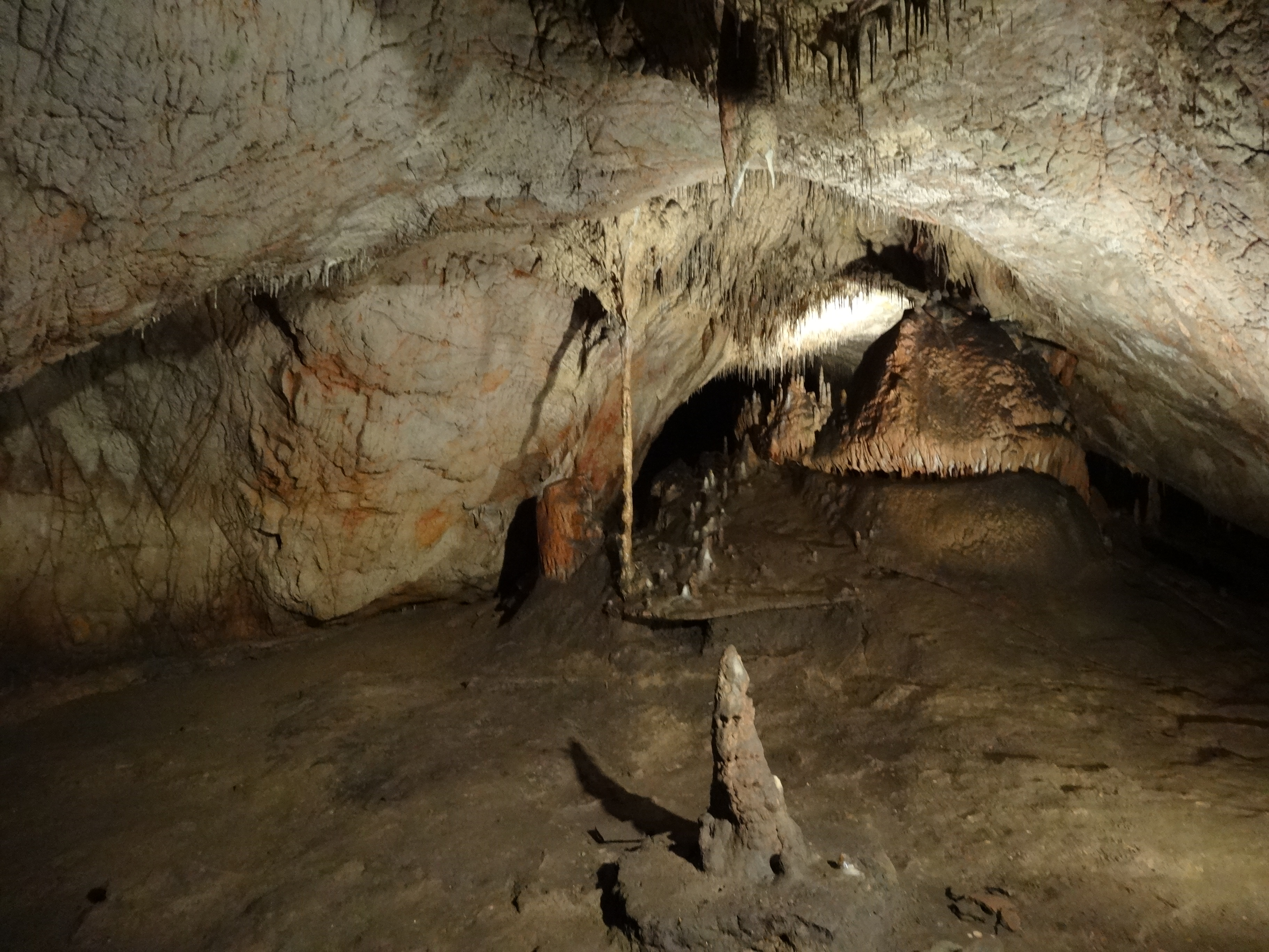 Jaskyňa Domica (agost 2012)